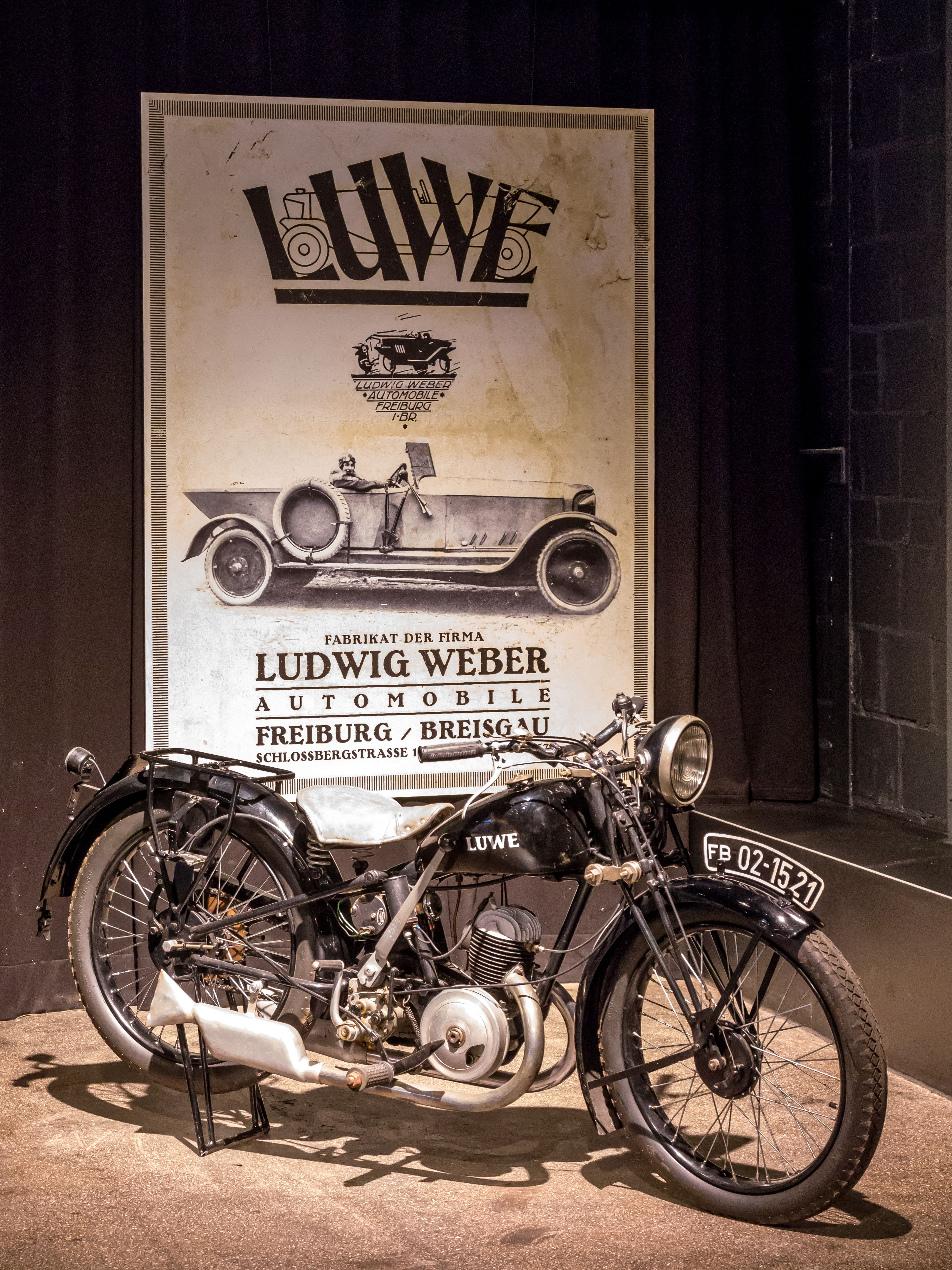 Ein LUWE Motorrad aus dem Jahre 1931, das im Oldtimer Museum Volante in Kirchzarten ausgestellt ist.. Es ist eins der späteren Modelle, die bei der Firma Wunderle in Kirchzarten montiert wurden.